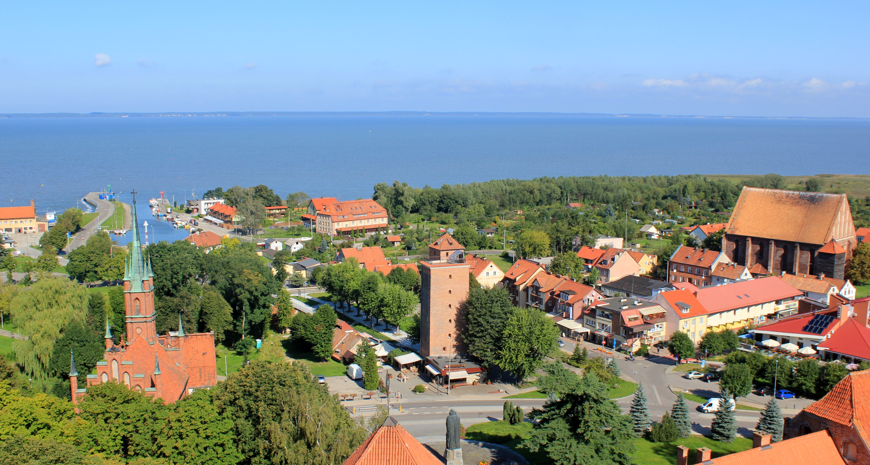 Blick vom Domberg auf Frombork (Frauenburg) und das Frische Haff.